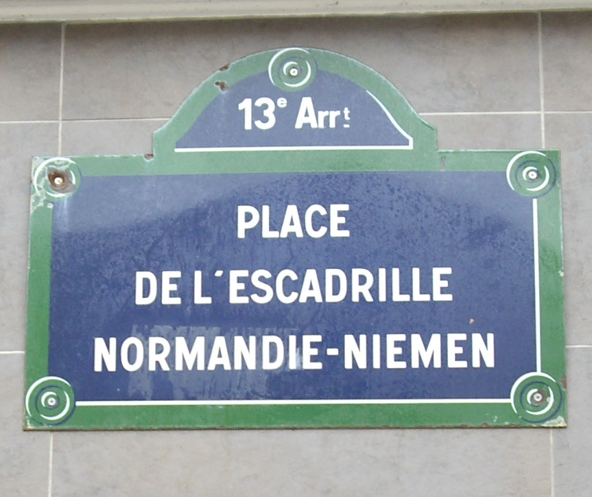 Plaque de la place de l'Escadrille-Normandie-Niémen, Paris 13e, en hommage à l'escadron de chasse du même nom